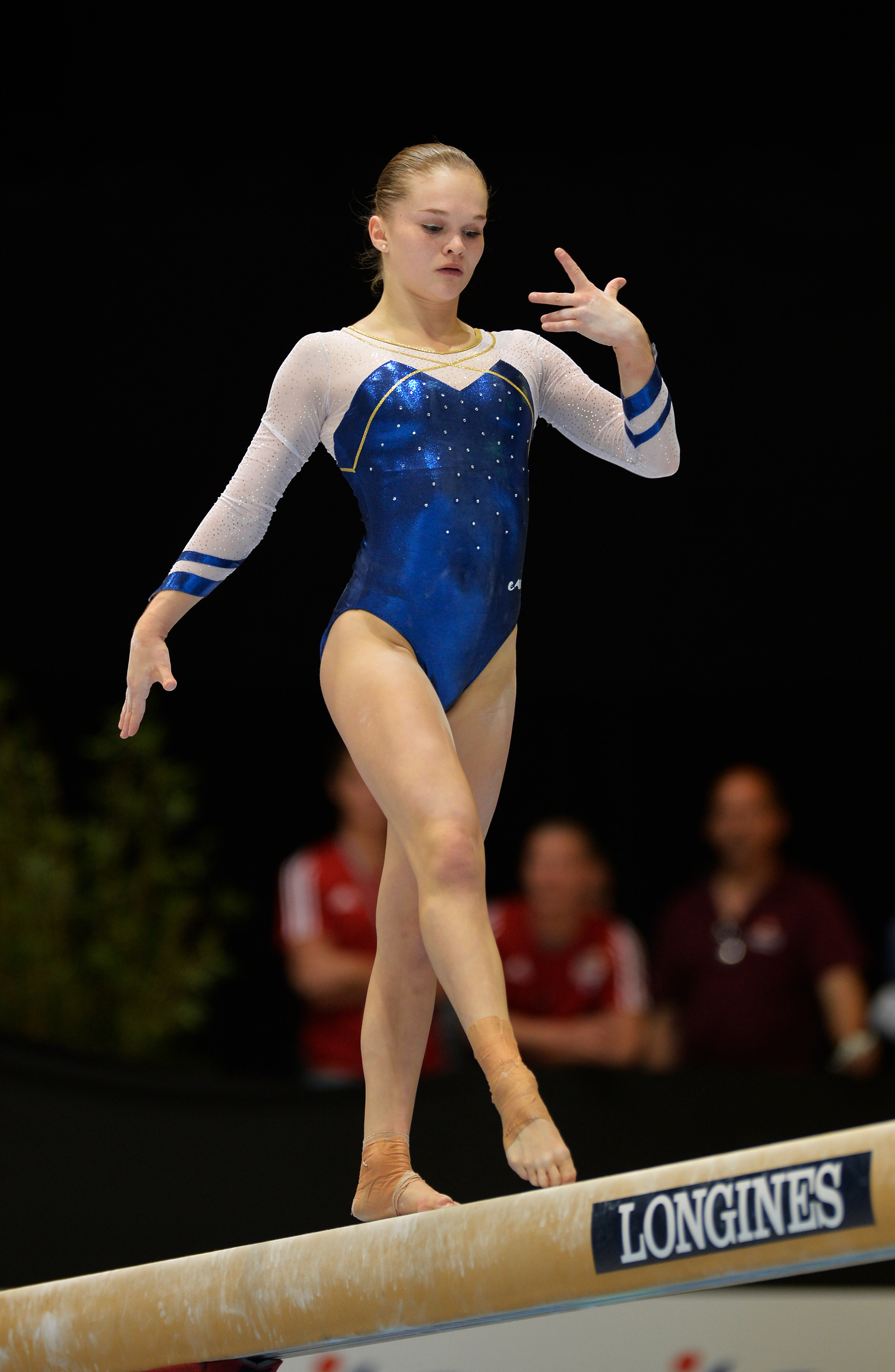 VM-gymnasten Ida Gustafsson VM Antwerpen 2013